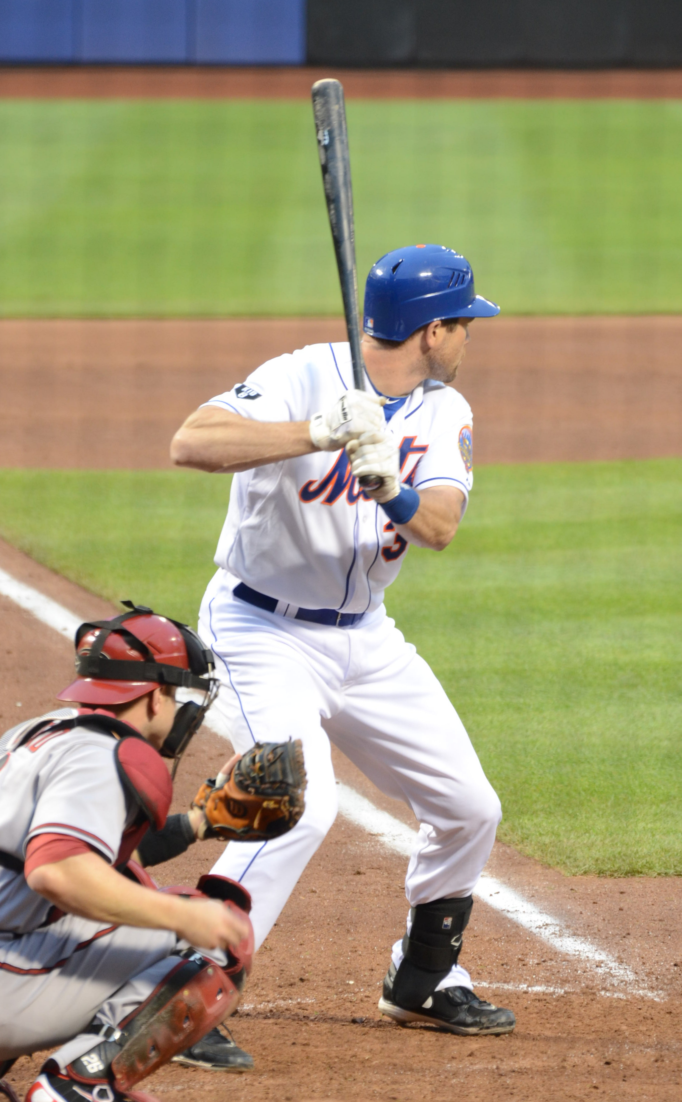 Vinny Rottino